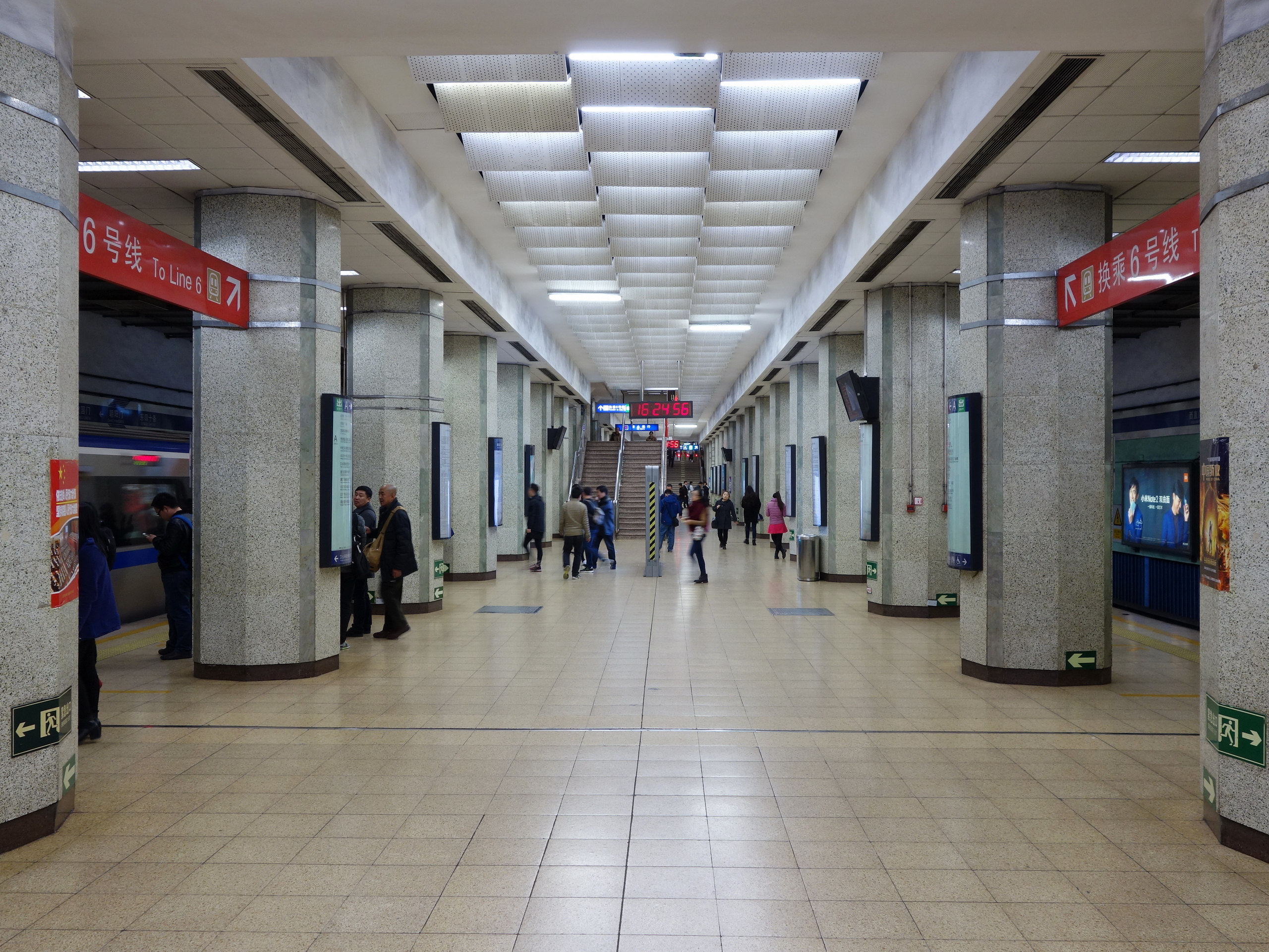 北京地铁2号线朝阳门站岛式站台。6号线一期工程朝阳门站建设中，在2号线站台中部加梯加板并在侧墙开洞，与6号线站厅东端相连形成换乘通道。